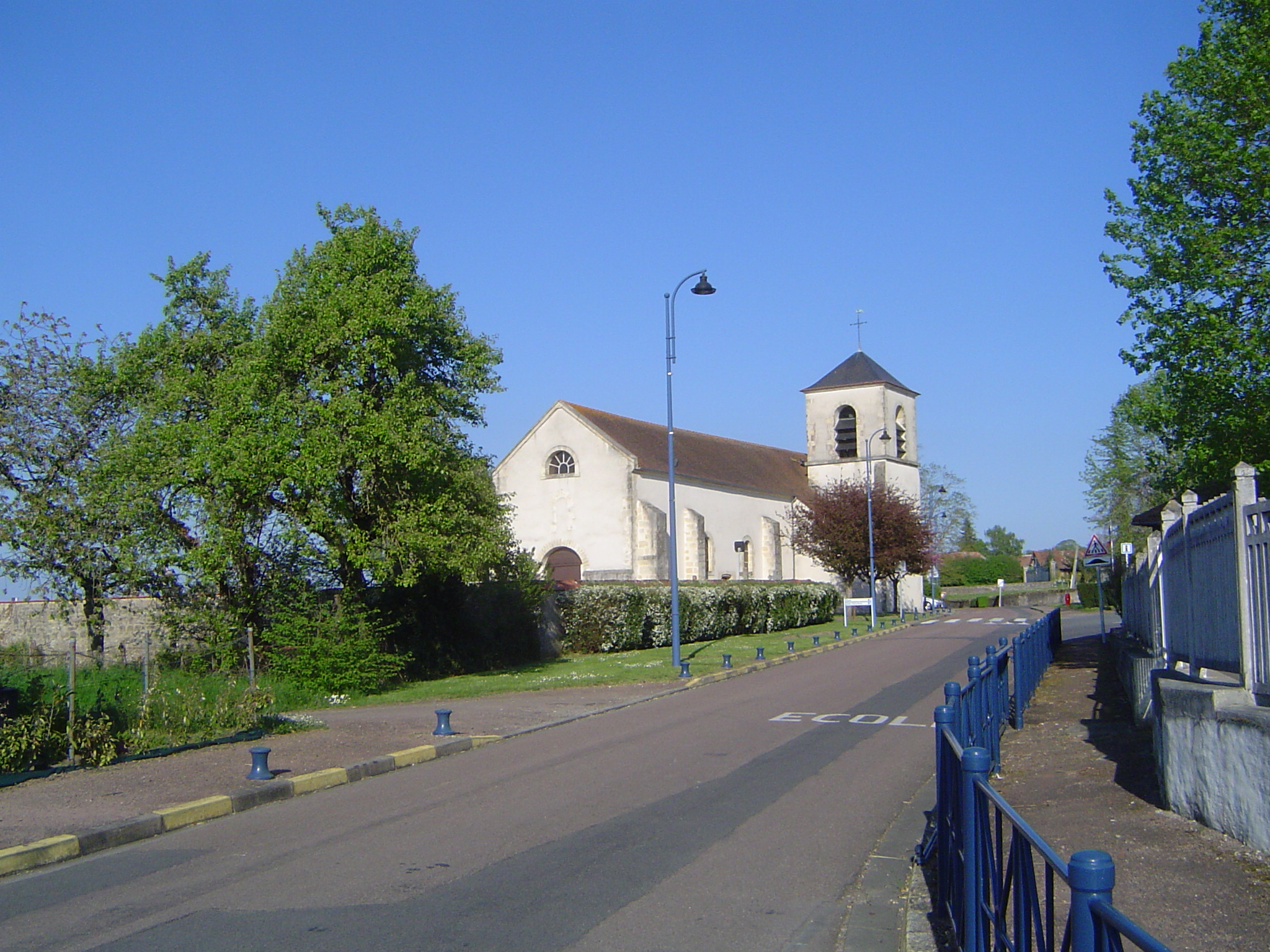 Sermoise - Eglise (3)